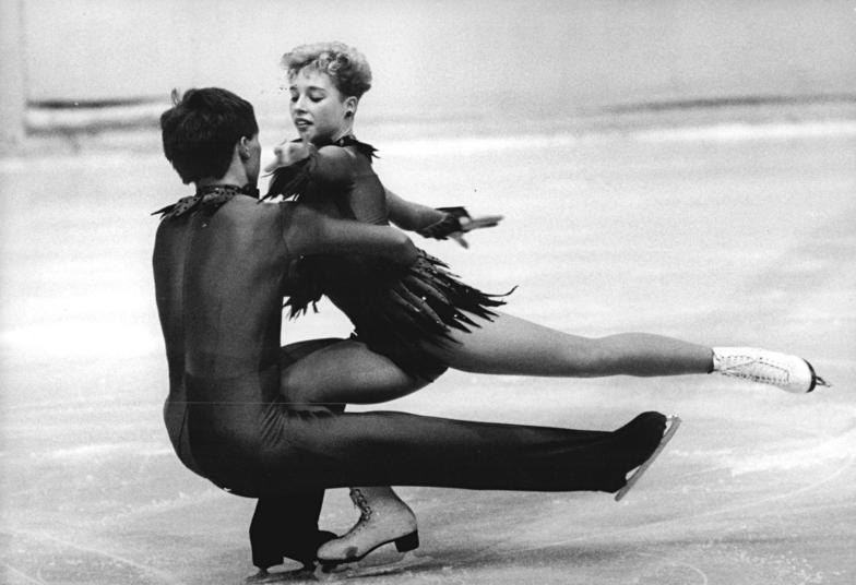 Peggy Schwarz, Alexander König ADN-ZB Thieme 12.12.1987 Karl-Marx-Stadt: DDR-Meisterschaften im Eiskunstlaufen.- Die neuen Paarlaufmeister Peggy Schwarz - Alexander König (SC Dynamo Berlin) während ihres Kürvortrages.